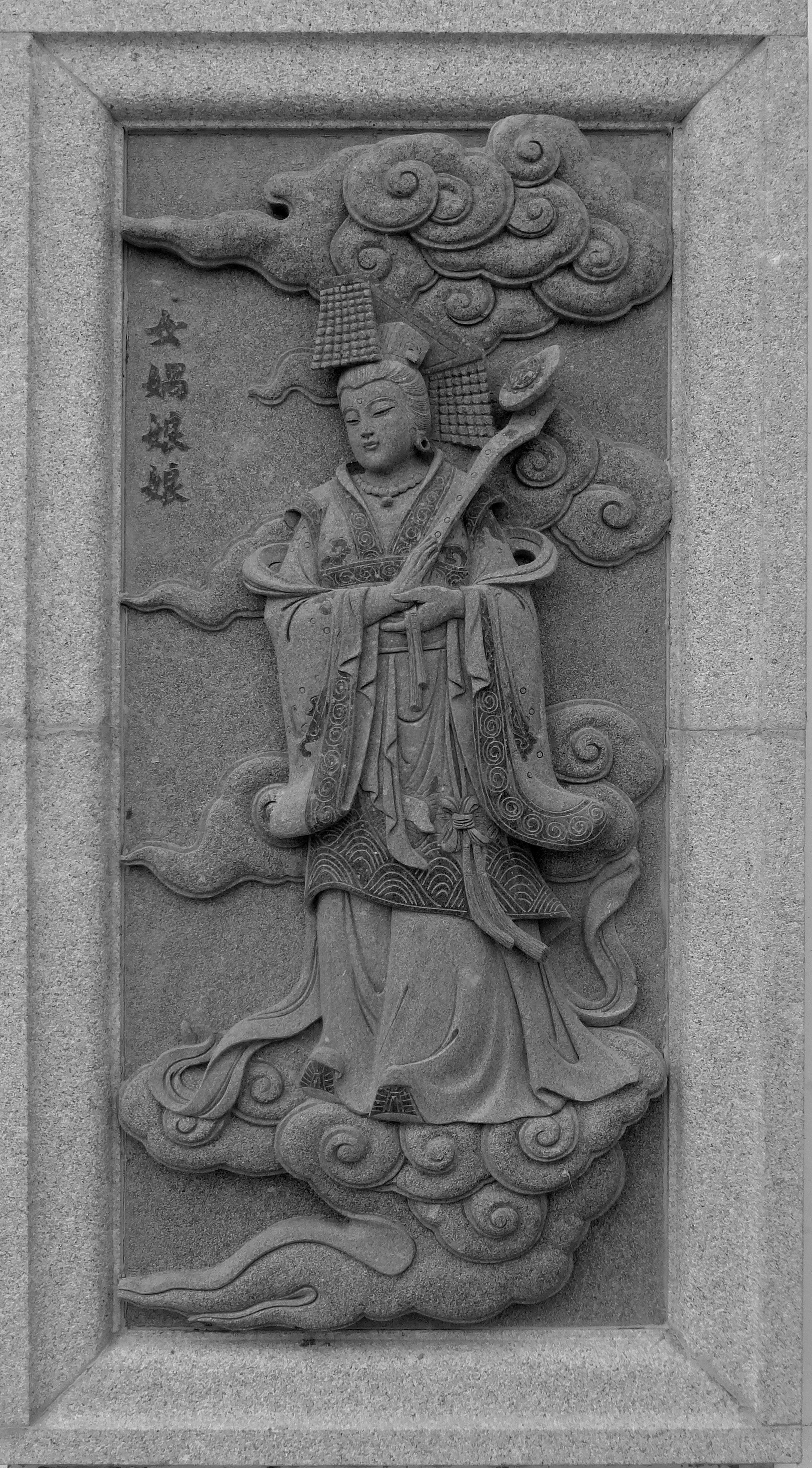 065 Nu Wa Niang Niang, Investiture of the Gods at Ping Sien Si, Pasir Panjang, Perak, Malaysia Photograph from the Ping Sien Si Temple in Perak, Malaysia taken by Anandajoti.